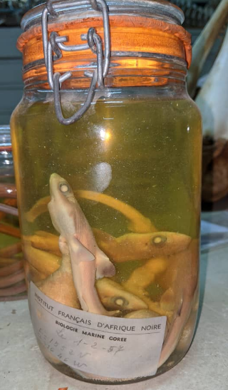 composante